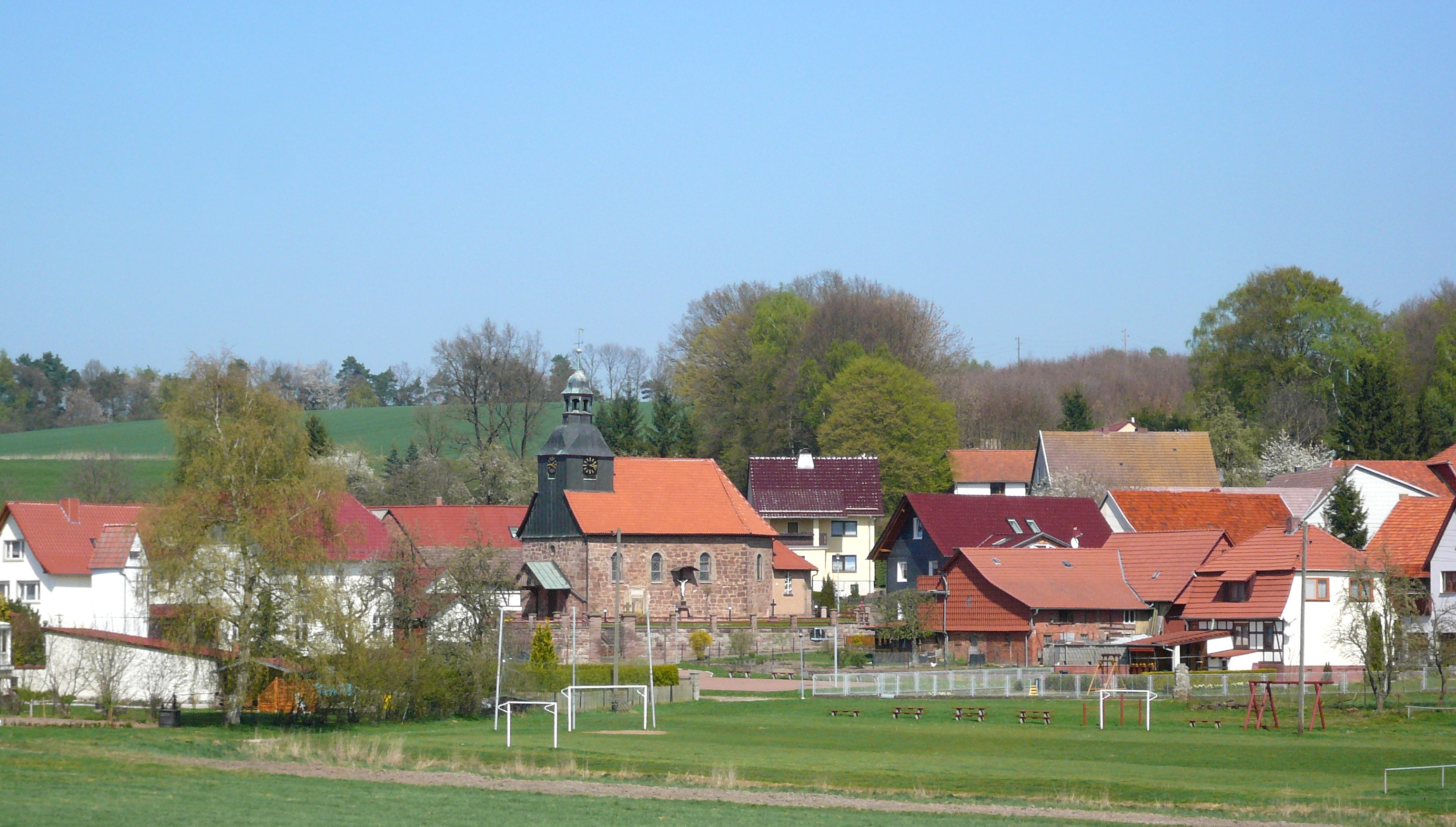 Ortskern von Schachtebich mit Sportplatz und Kirche St. Magnus, Landkreis Eichsfeld, Thüringen